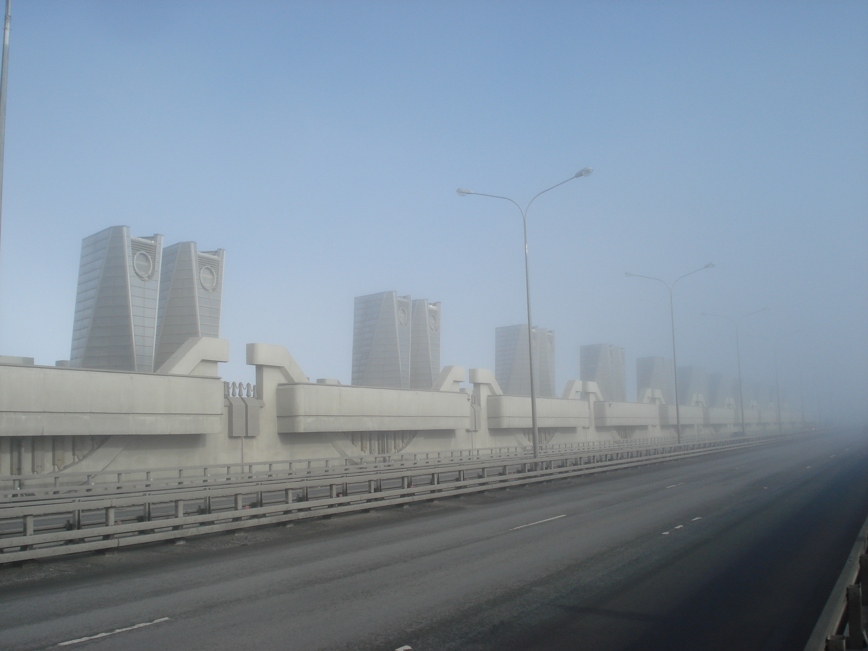 Дамба В1